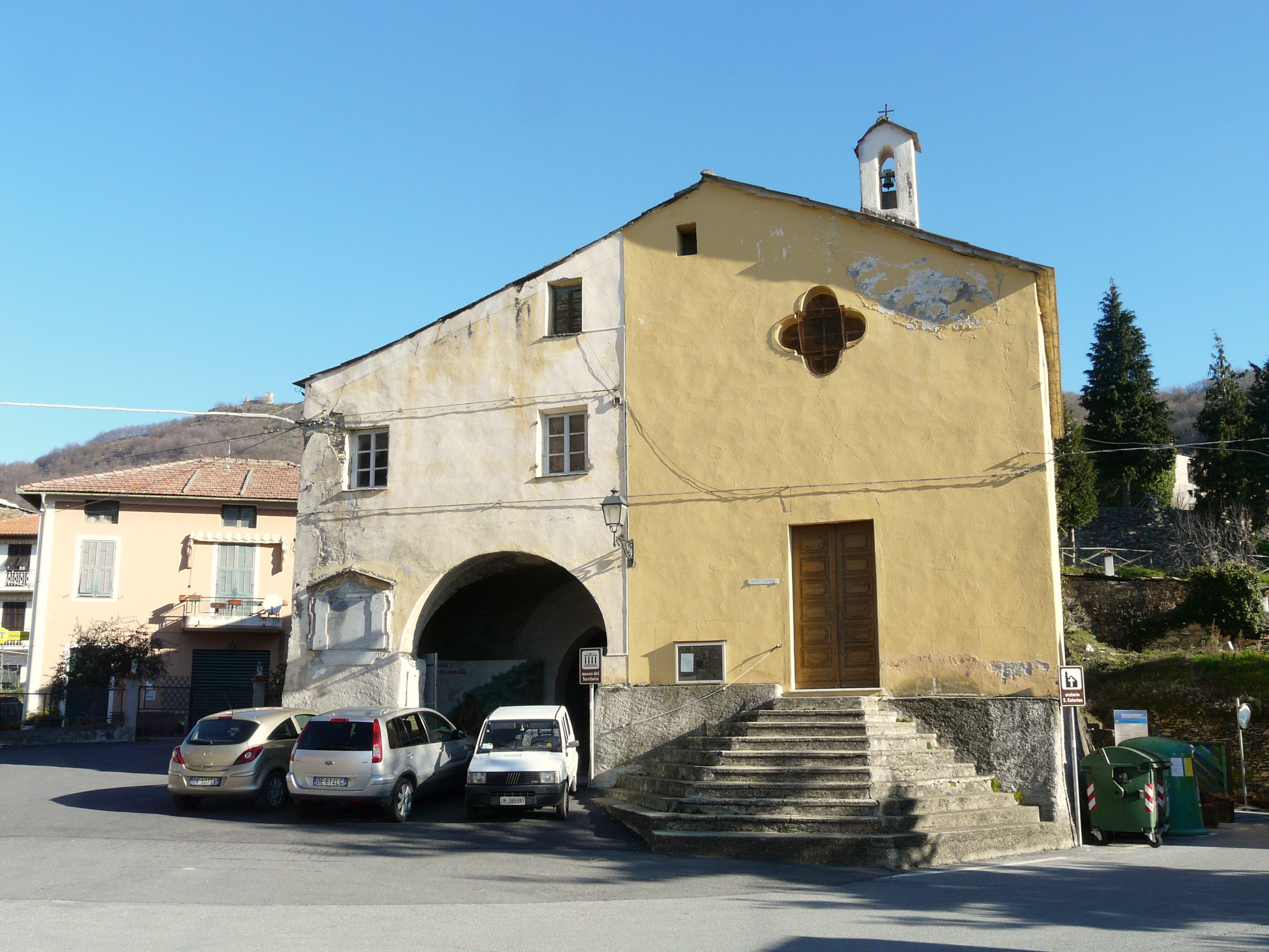 Oratorio di Santa Caterina e museo del Territorio, Aquila d'Arroscia, Liguria, Italia